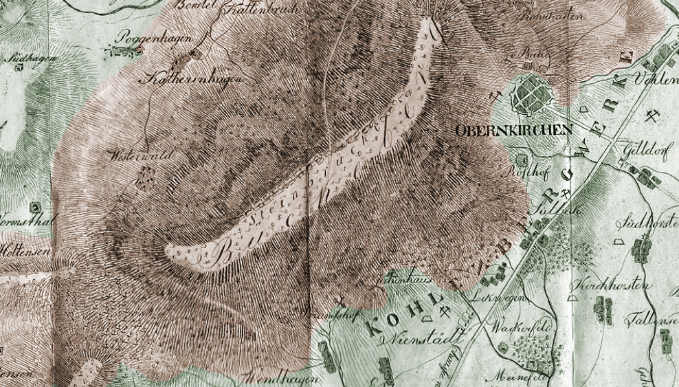 Zeichnung des Bückebergs von Anton Wilhelm Strack